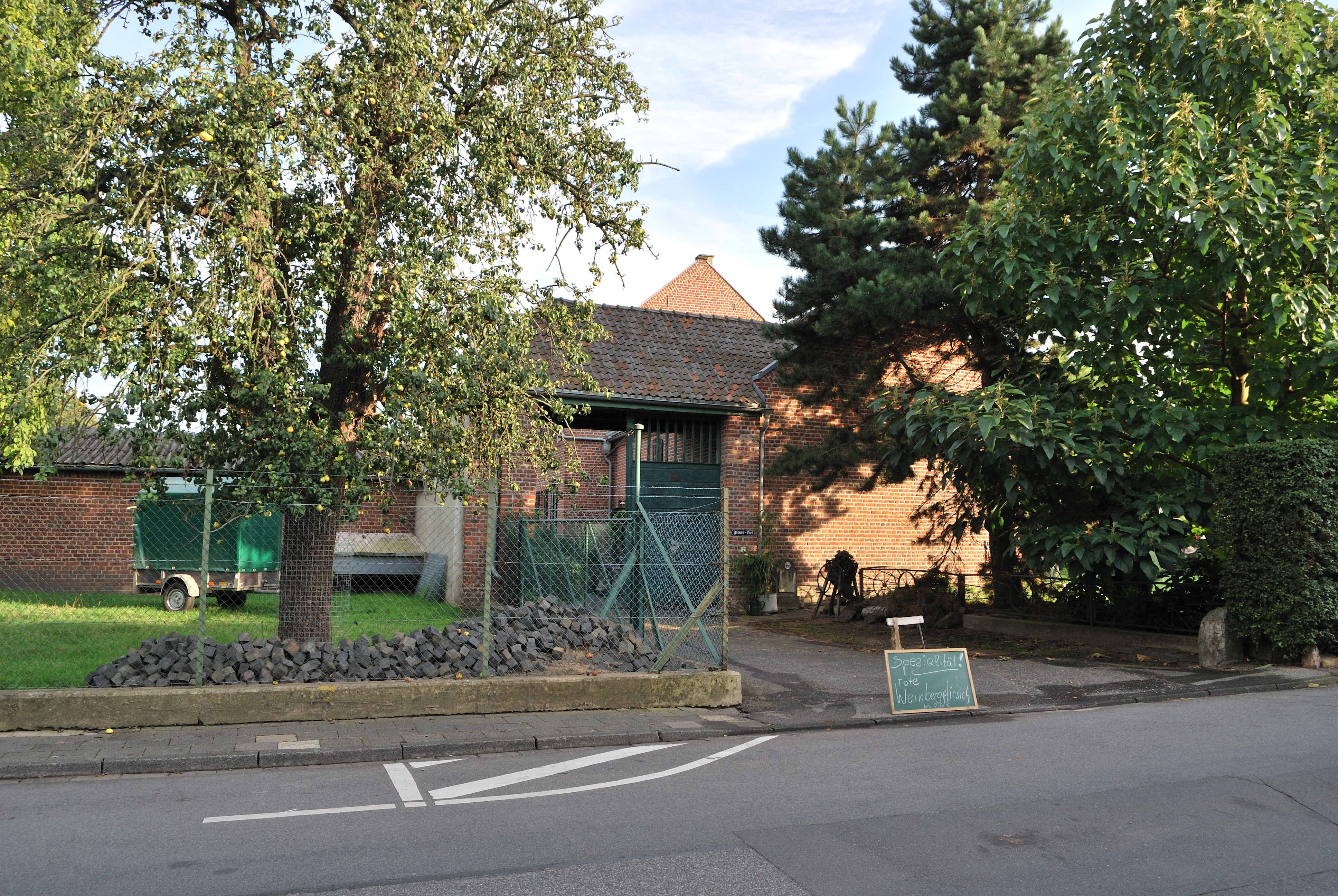 In der Mitte 16; Denkmalnummer 109